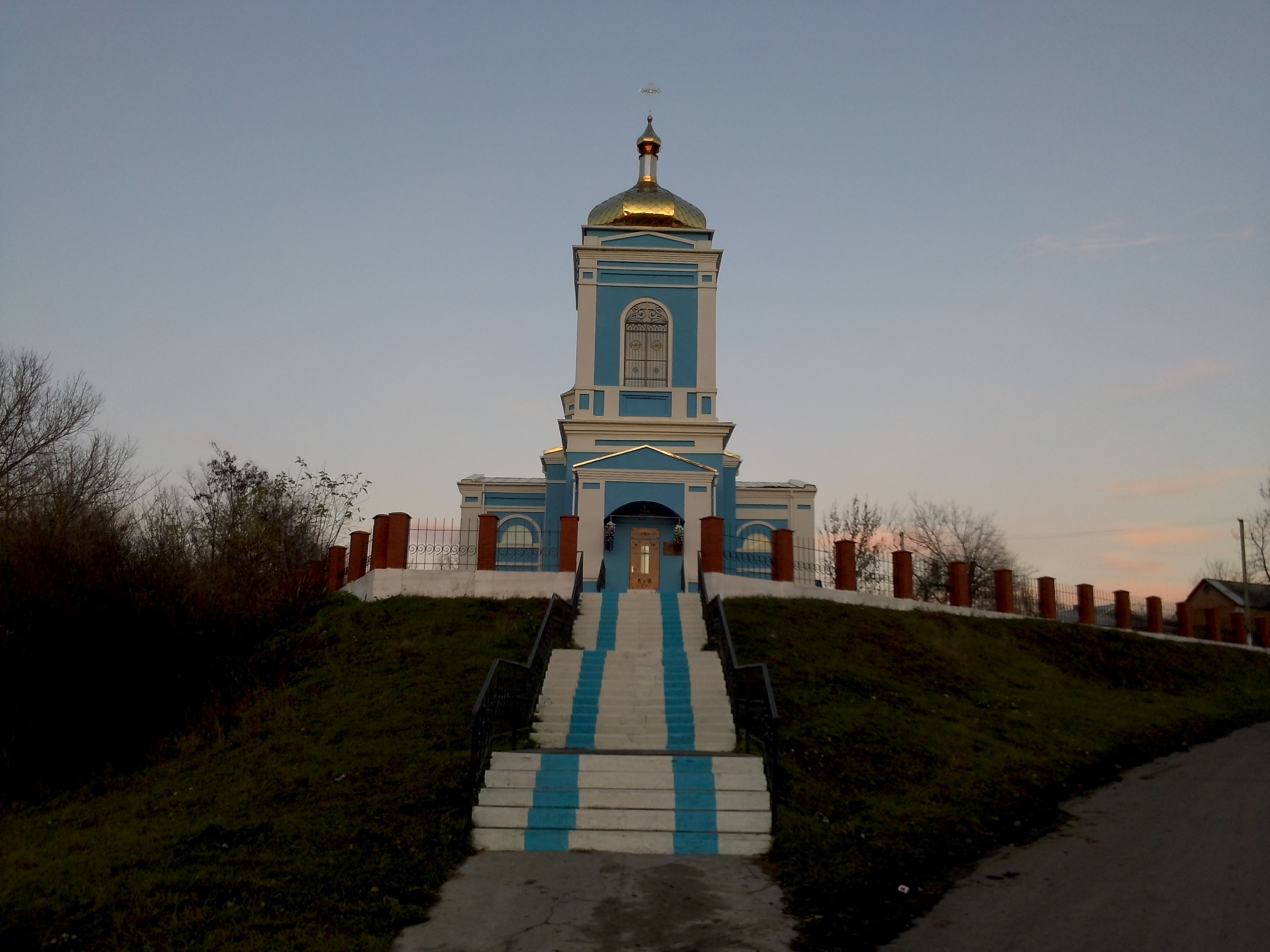 Церква в с. Зозів